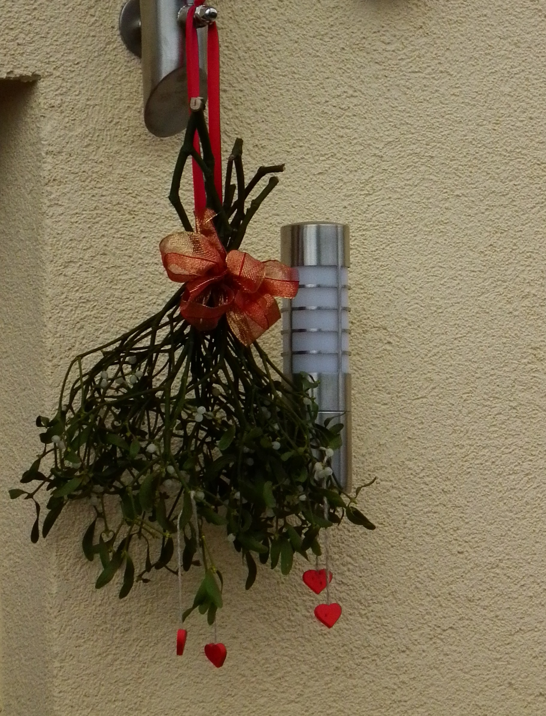 Mistelzweig als Türdekoration, fotografiert in Heidelberg (Baden-Württemberg, Deutschland)